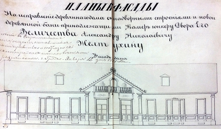 Беларуская (тарашкевіца): Горадня (Horadnia), дом Элізы Ажэшкі (Eliza Ažeška)